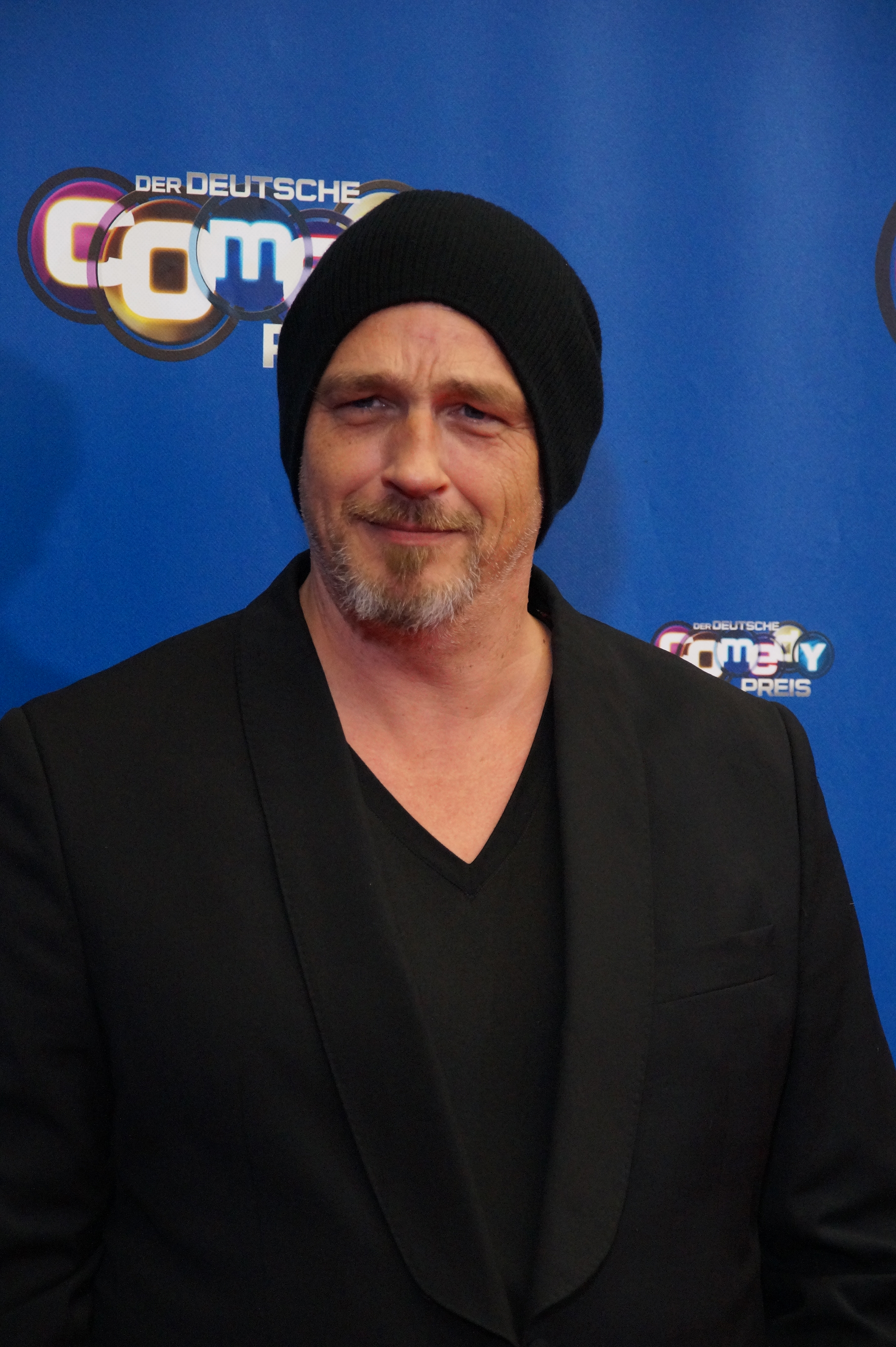 Torsten Sträter beim Comedypreis 2016, im Oktober, Köln.